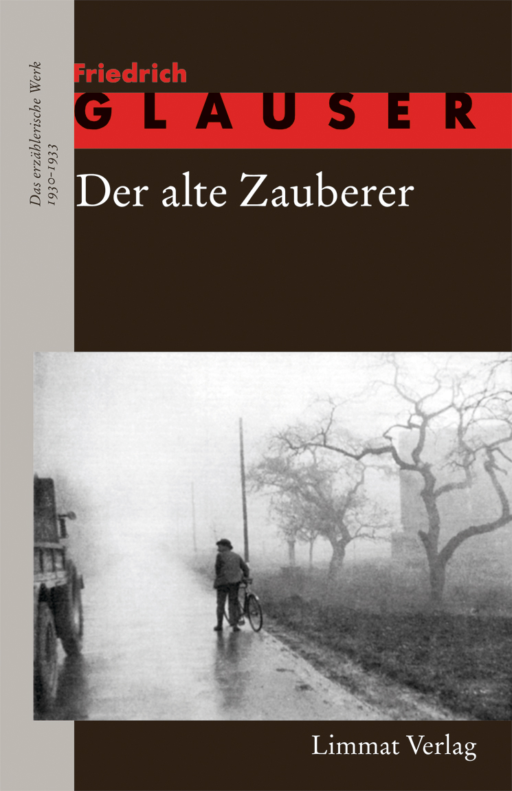 Cover von "Der alte Zauberer - Erzählungen 2" (Werkausgabe des Limmat Verlages)